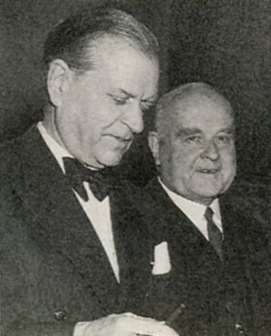 Sven Markelius (vänster) och Albert Lilienberg omkring 1954